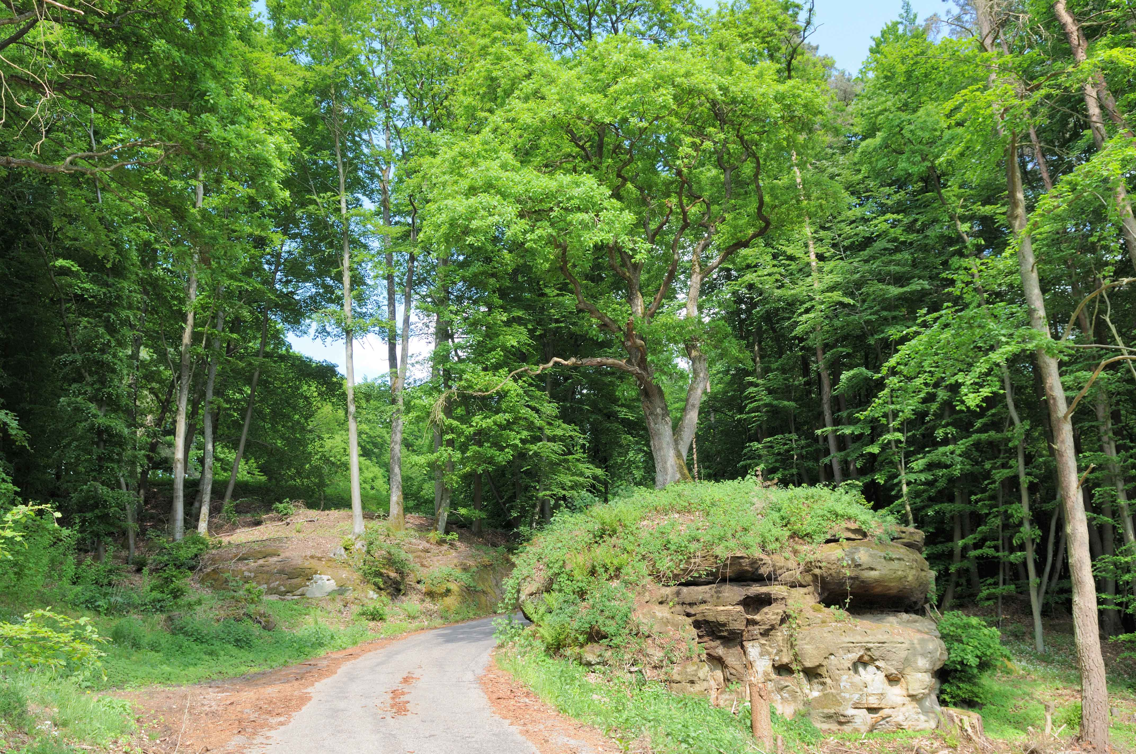 Eech zu Biereng.